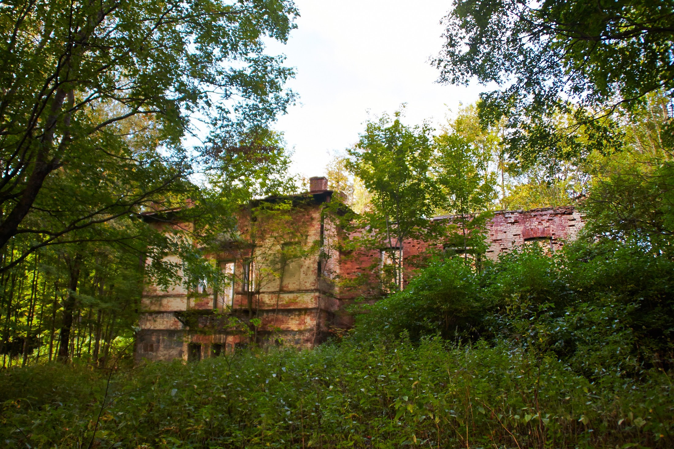 Усадьба Шешурино (А.Н. Куропаткина): Шешурино, Торопецкий район, Тверская область